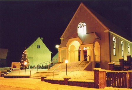 Außenansicht Neuapostolische Kirche Coswig (Anahlt)